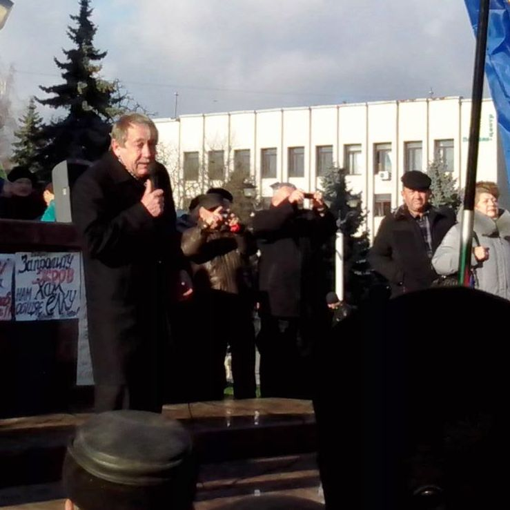 Лев Бірюк. Виступ під час Євромайдану у Хмельницькому.